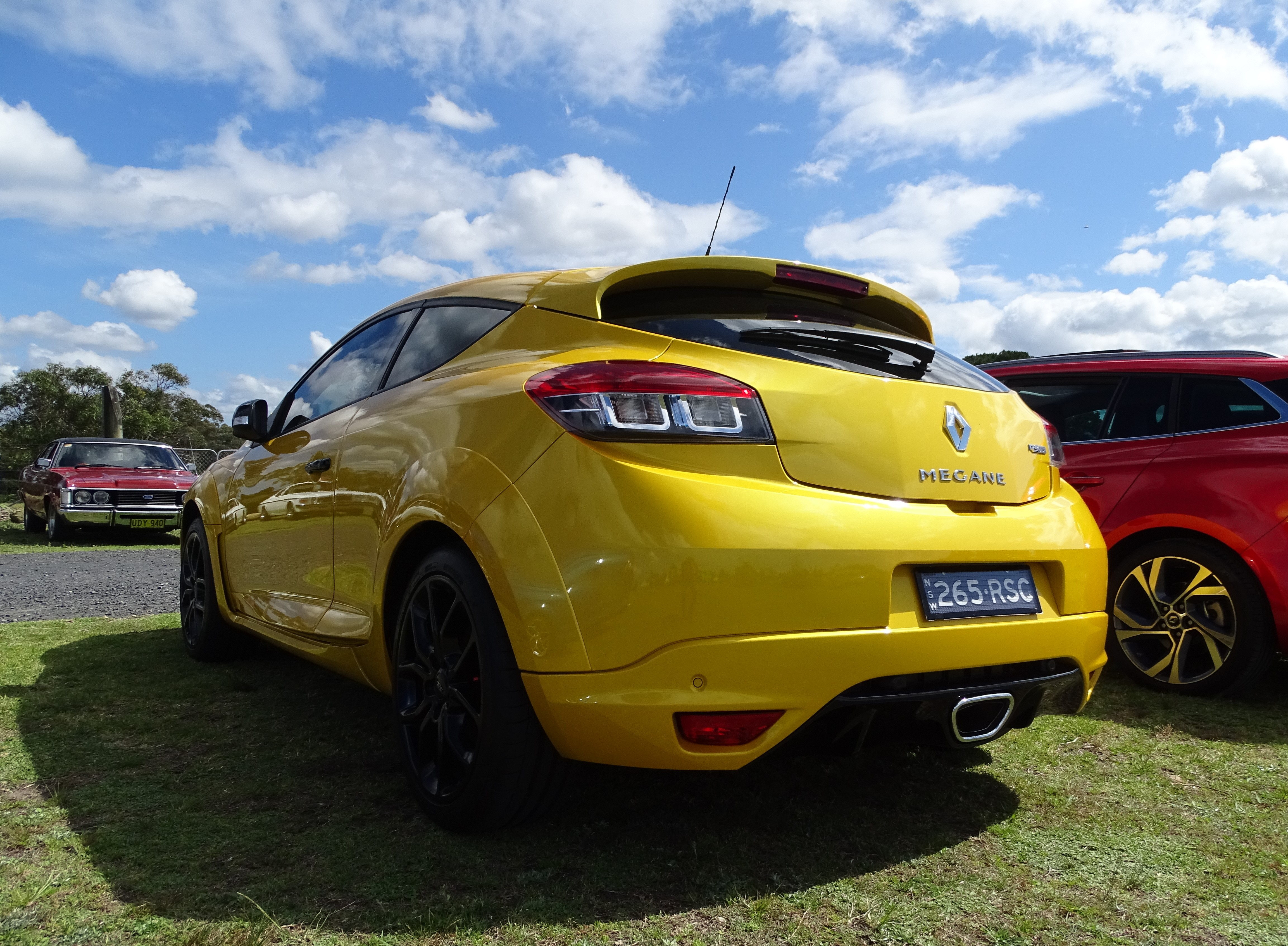 Renault Megane RS265 Cup